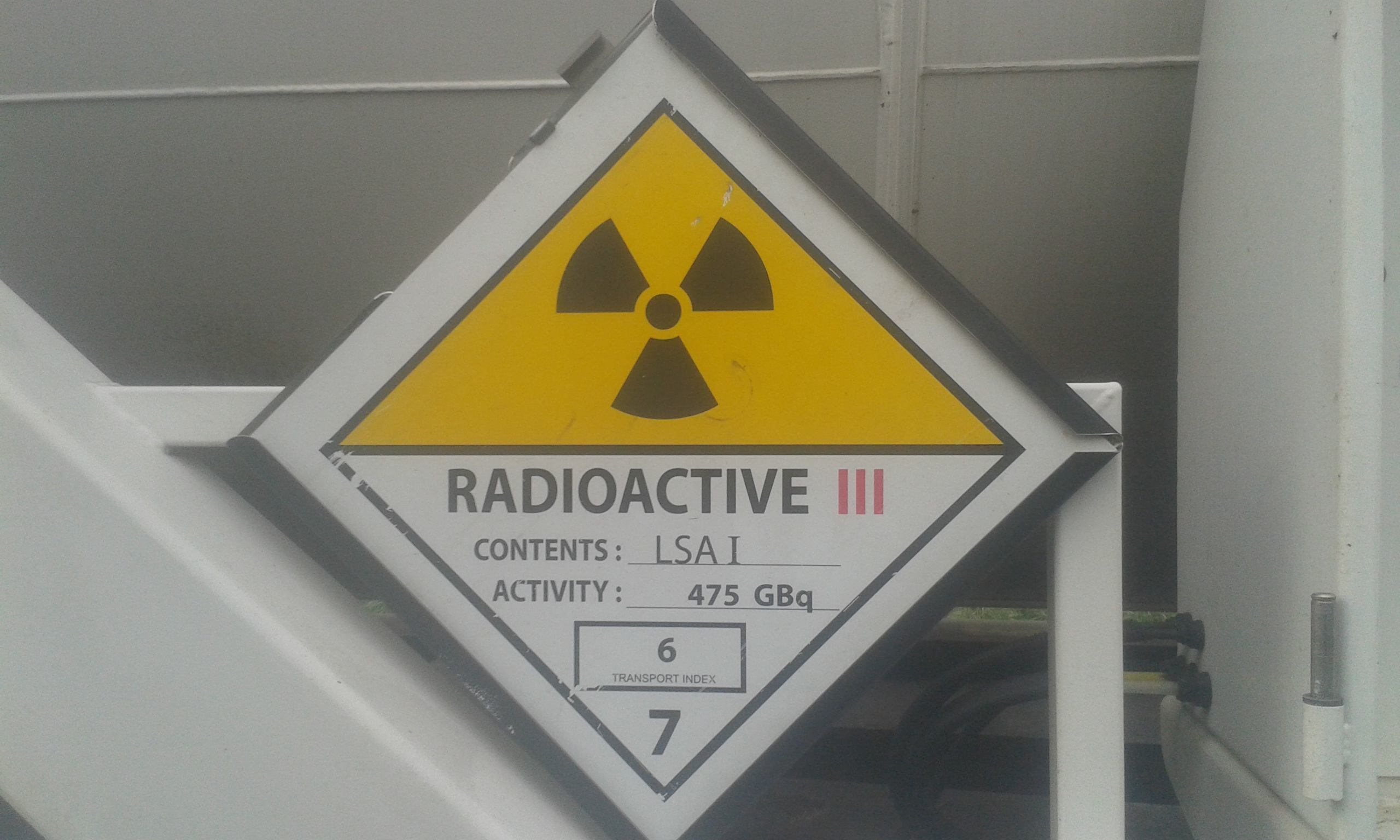 Cette photo d'un panneau de signalisation sur les parois latérales d'un conteneur d'uranium (UF4) a été prise lors du blocage d'un train par "stop uranium".